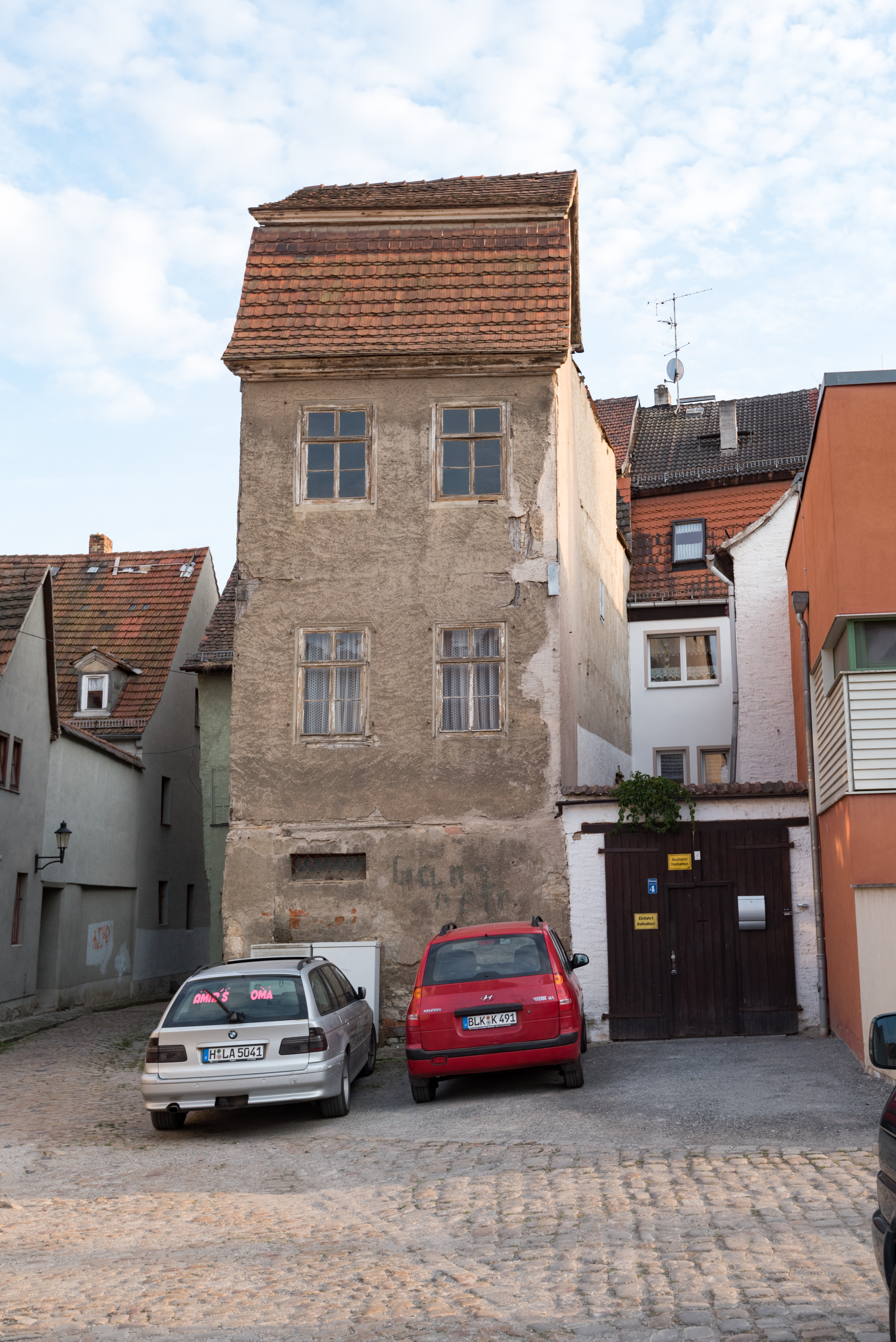 Naumburg (Saale), Windmühlenstraße 4